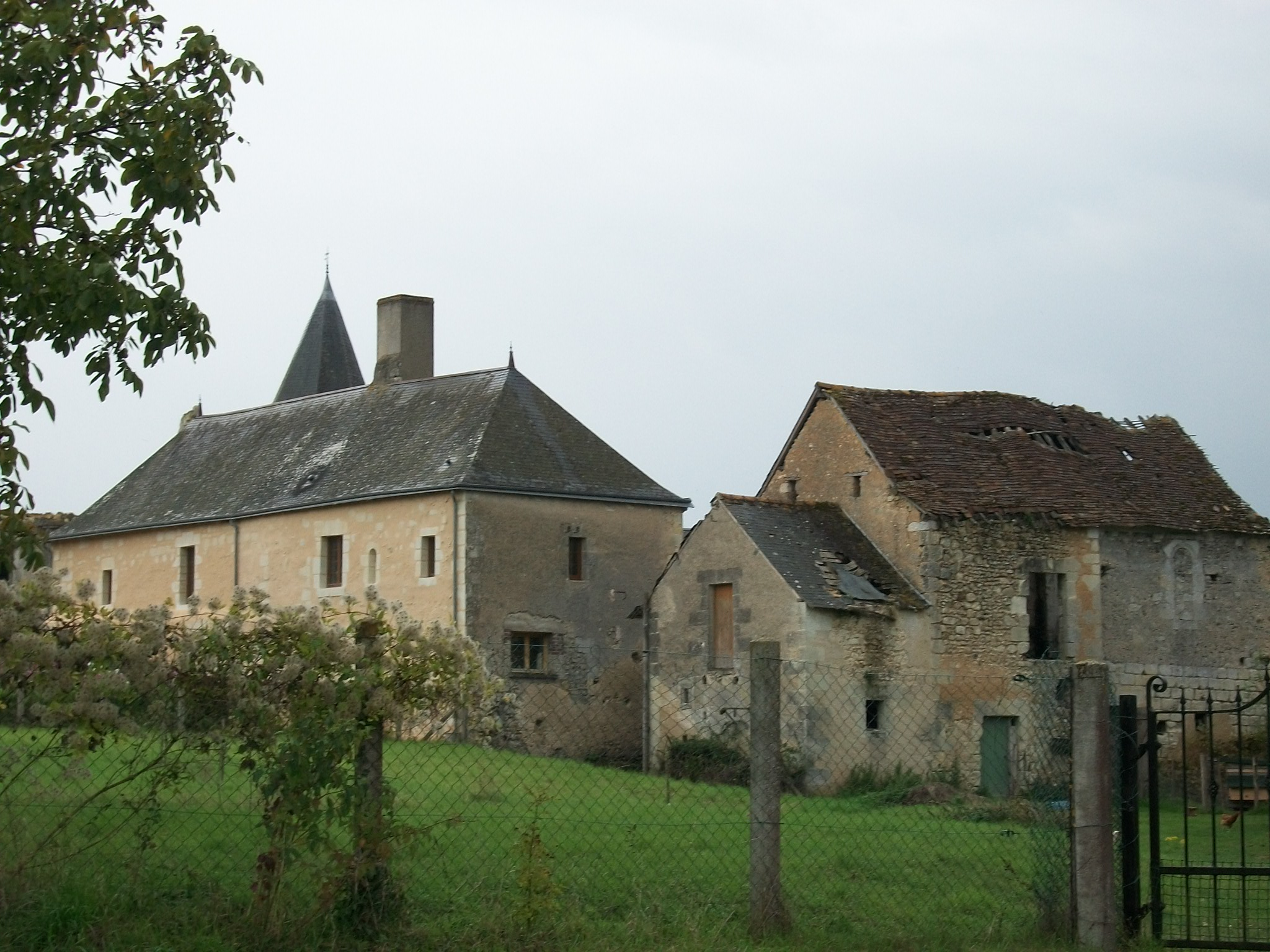 Vestiges de la Seigneurie de Vernay, Sarthe